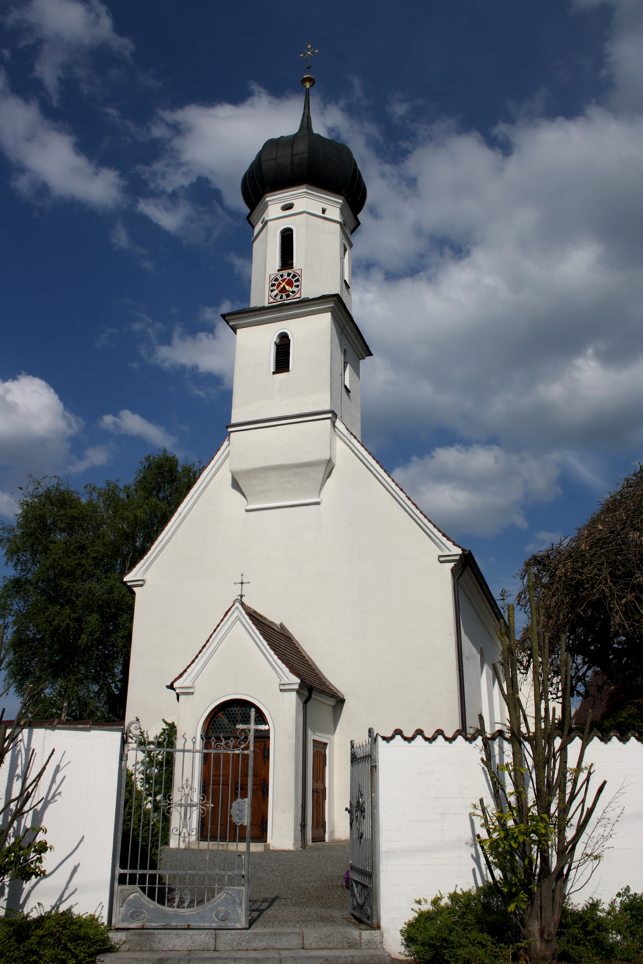 Katholische Pfarrkirche Mariä Himmelfahrt in Frauenriedhausen, einem Stadtteil von Lauingen im Landkreis Dillingen an der Donau (Bayern), im Kern aus dem 13. Jahrhundert mit Umgestaltung und Aufbau des Dachreiters mit Zwiebelhaube 1734, mit Vorzeichen an der Westfassade, Ansicht von Westen